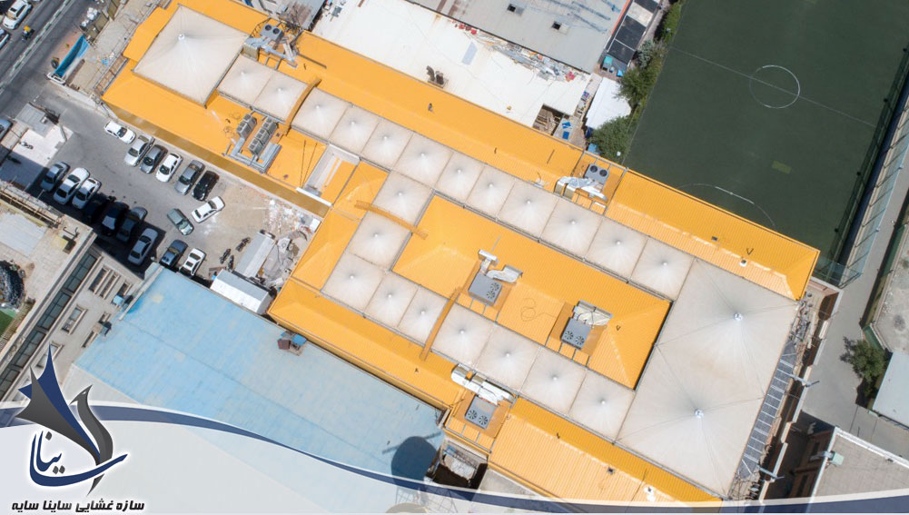 سقف های چادری مرکز خرید جنت آباد